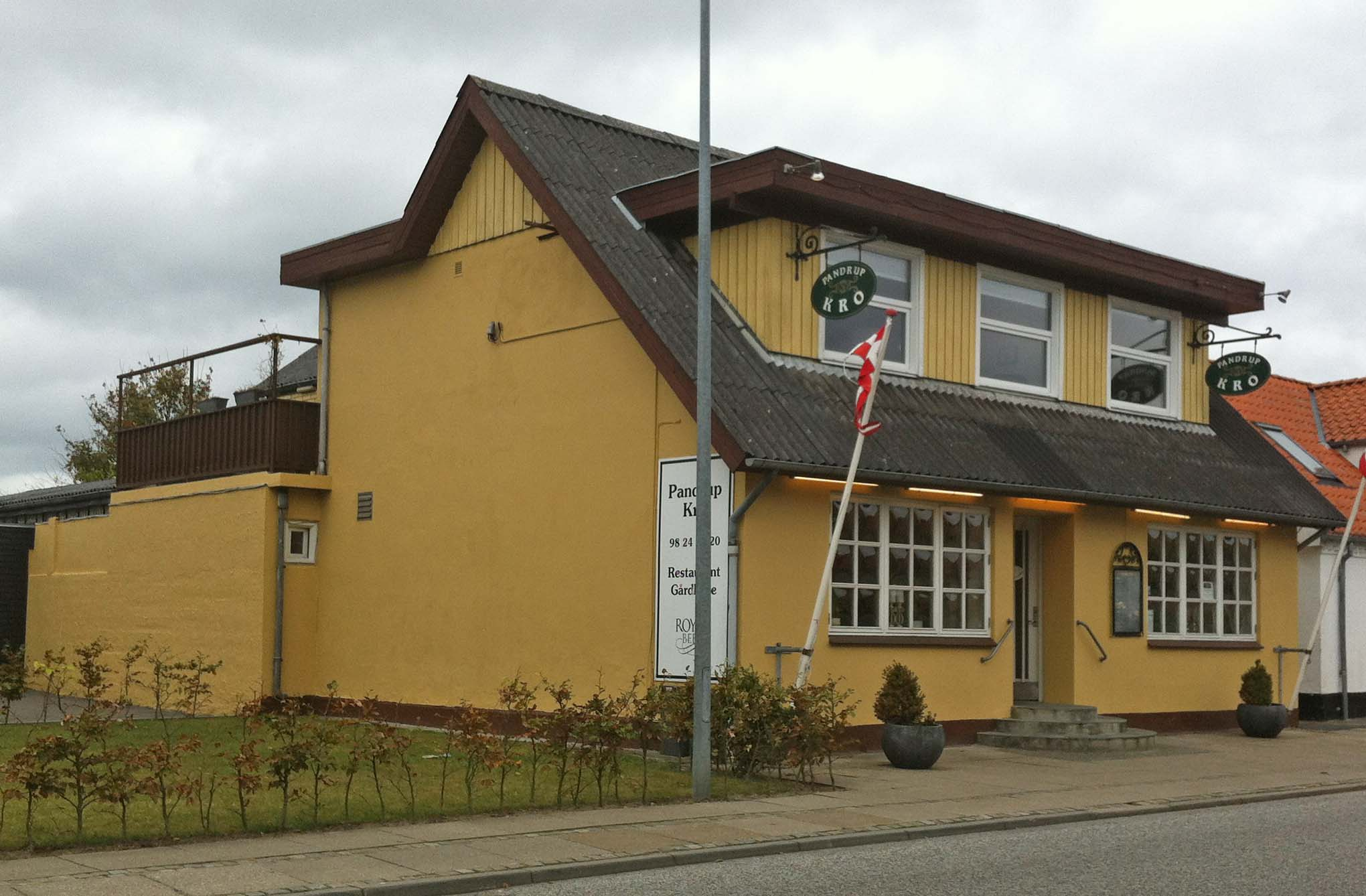 Pandrup Kro